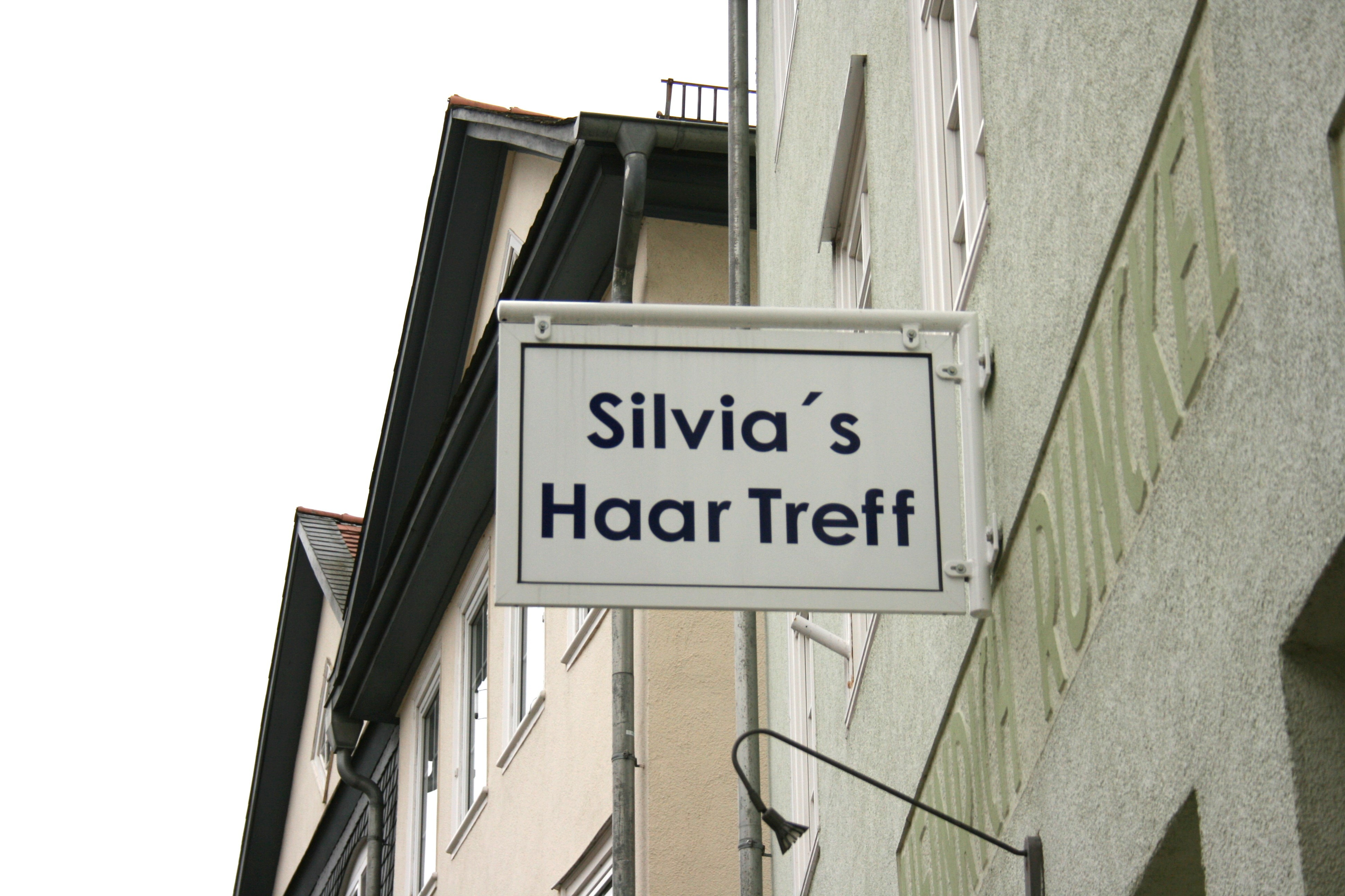 Weidenhäuser Straße in Marburg: Schild mit Deppenapostroph und Deppenleerzeichen